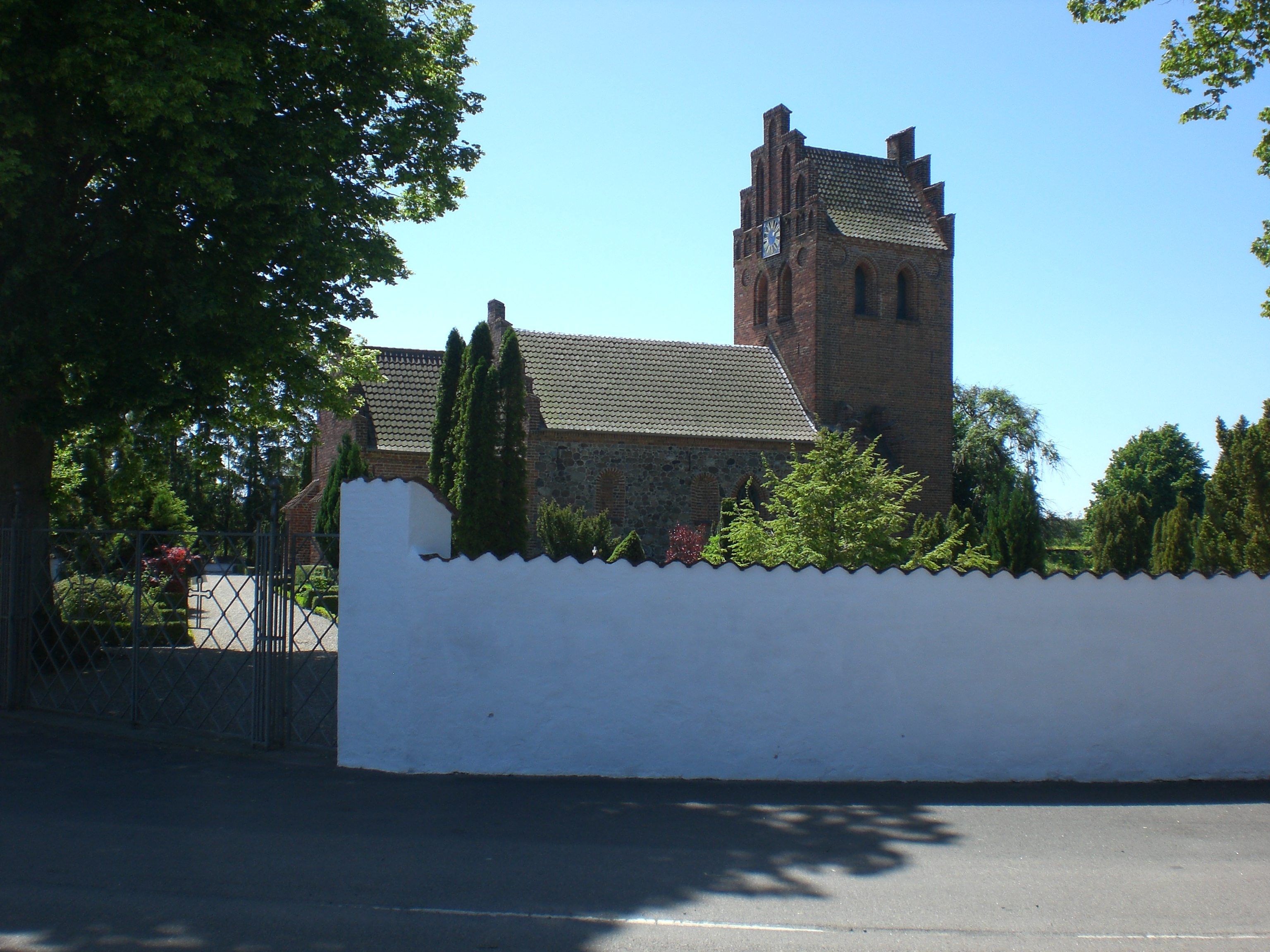 Gørløse Kirke, 3330 Gørløse